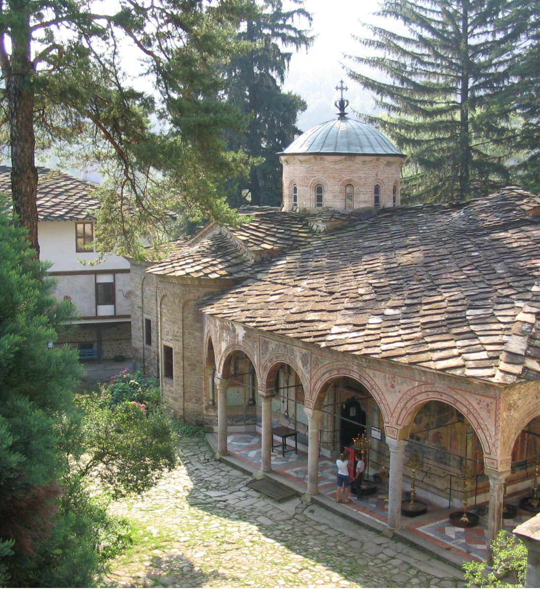 Eglise de la Sainte Vierge dans le monastère de Troyan